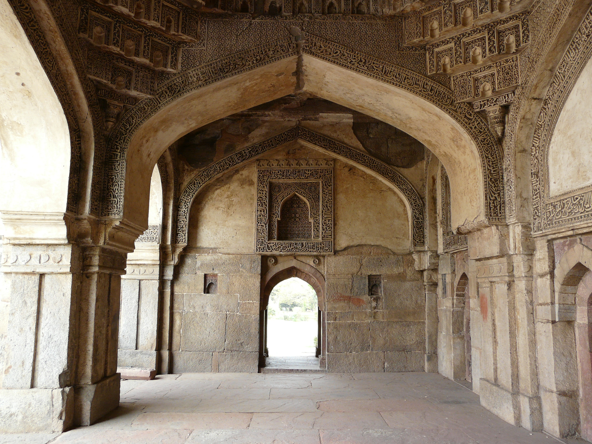 Bada Gumbad mosque interior Bara Gumbad, Lodhi Garden, Delhi